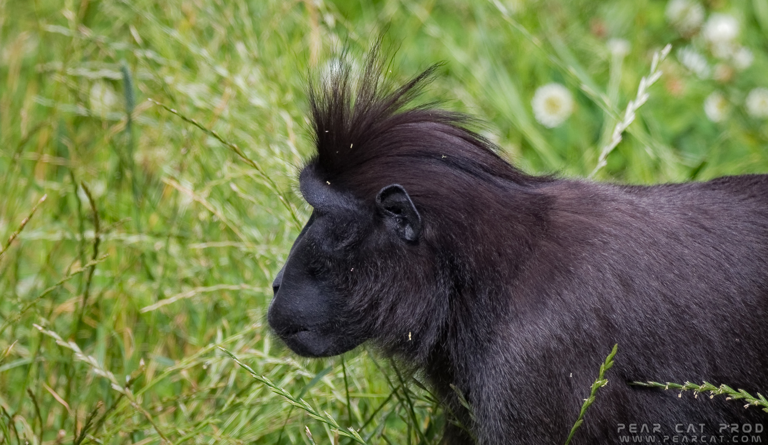 Macaque à crête de profil au parc Pairi Daiza